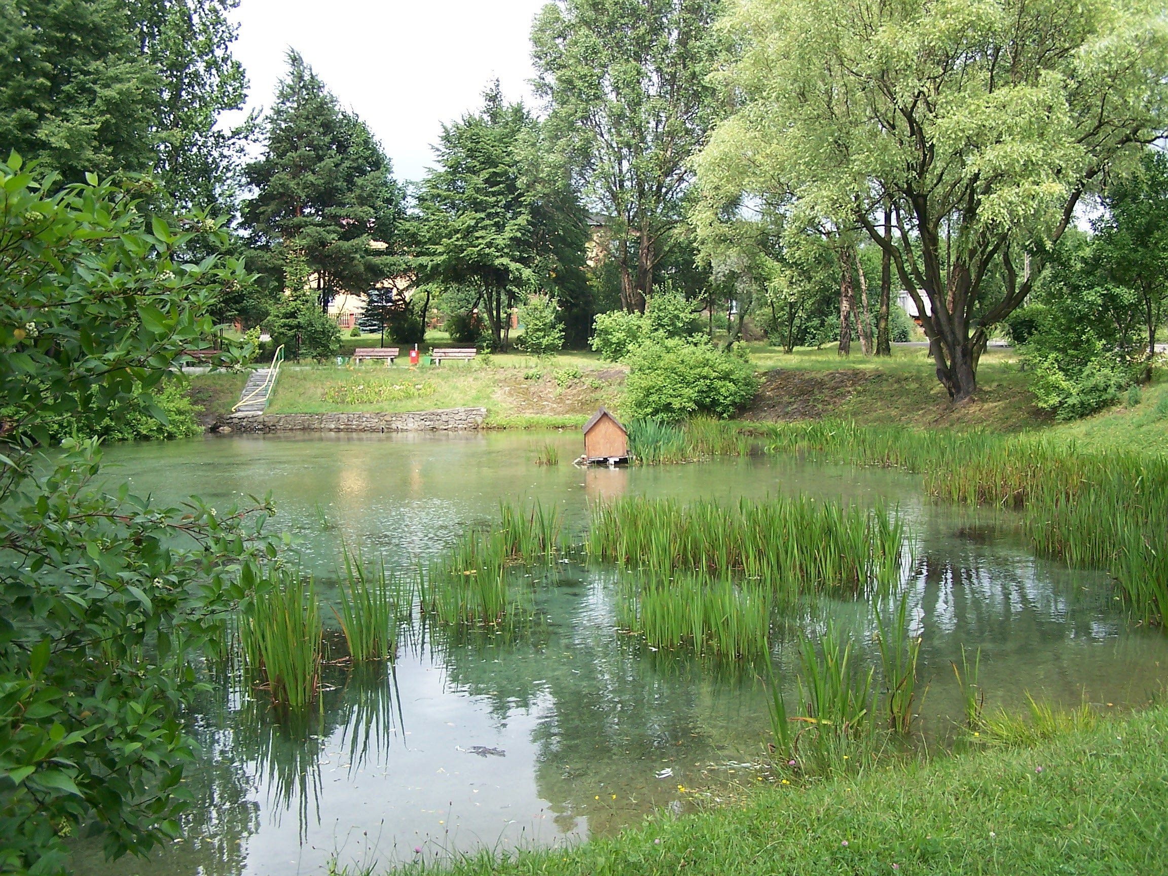 Staw w Wywierzysku w Strzemieszycach Wielkich (Dąbrowa Górnicza). foto: geograf.gp